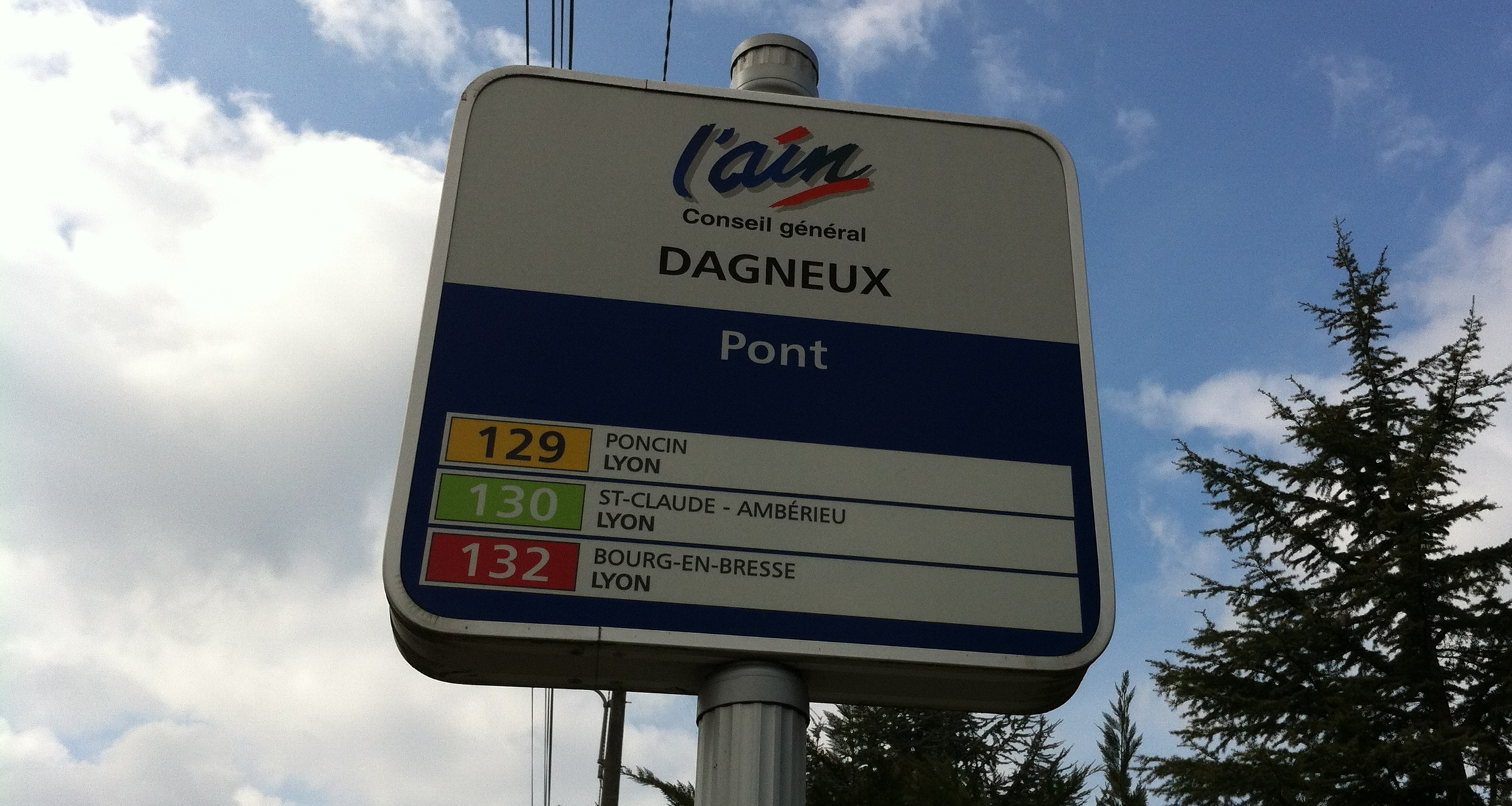 Panneau - Cars de l'Ain à Dagneux.